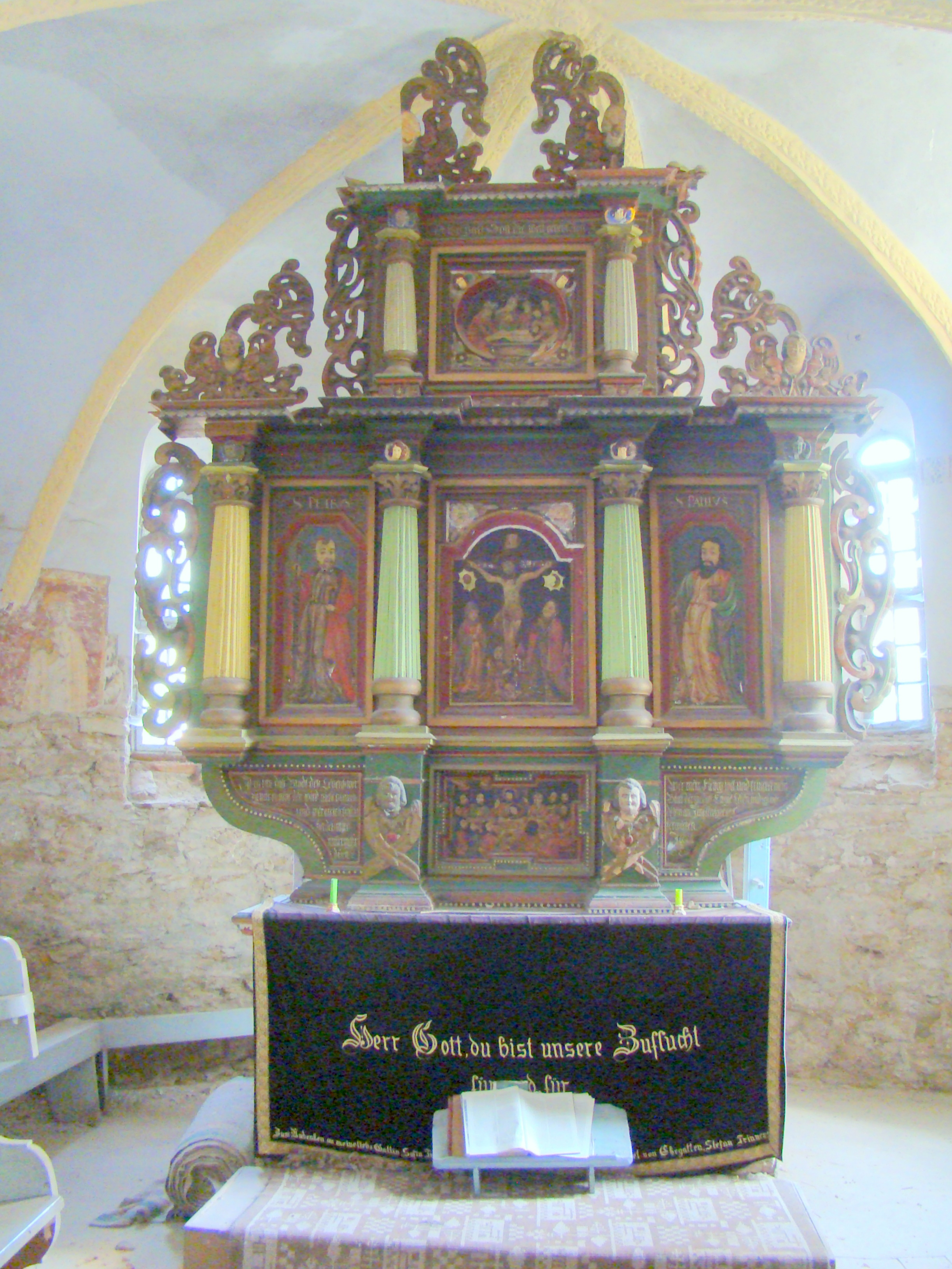 Ansamblul bisericii evanghelice, sat Ormeniș; comuna Viișoara Str. Principală 204 sec. XVI - XVIII